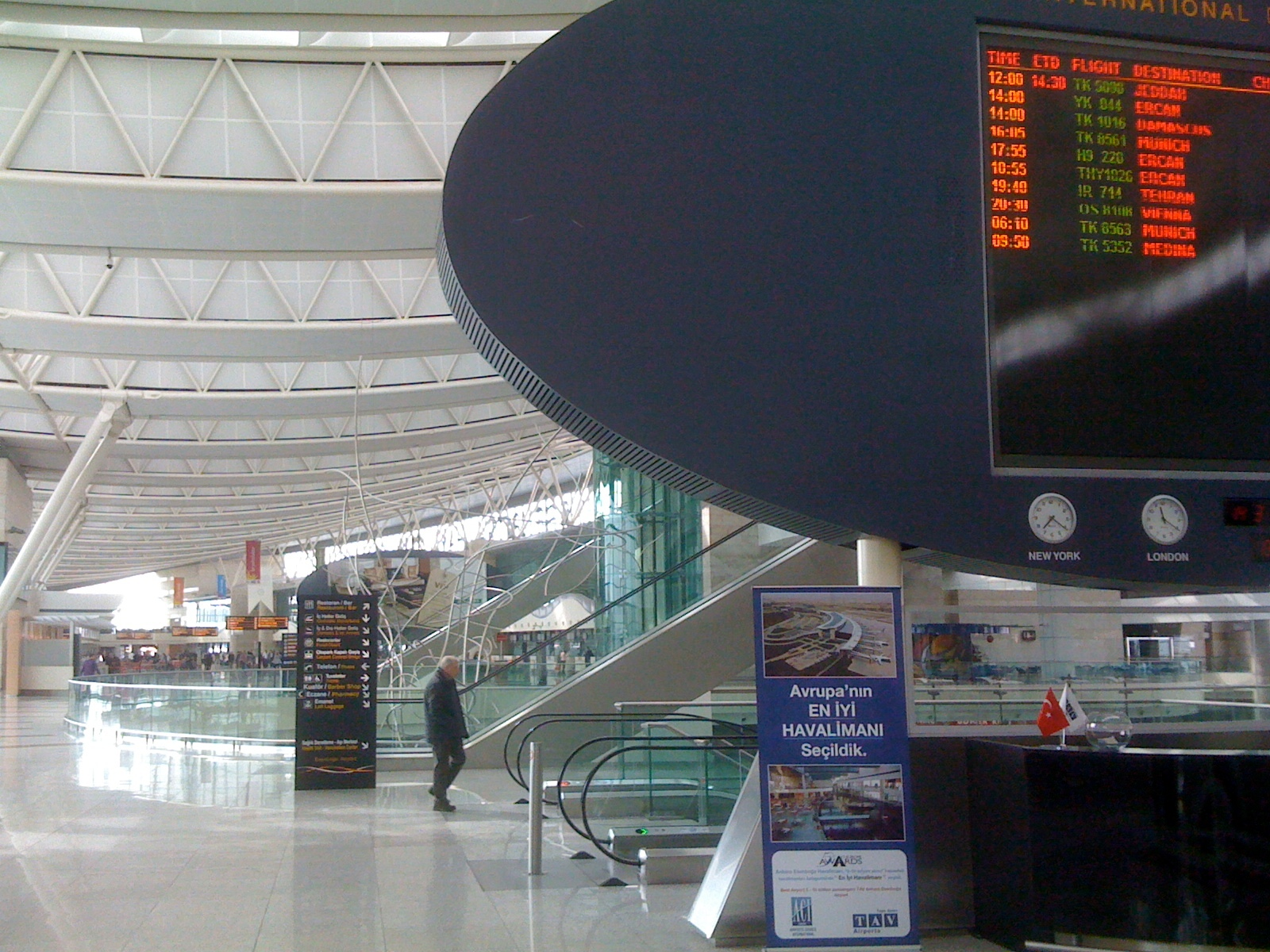 Ankara airport: departures